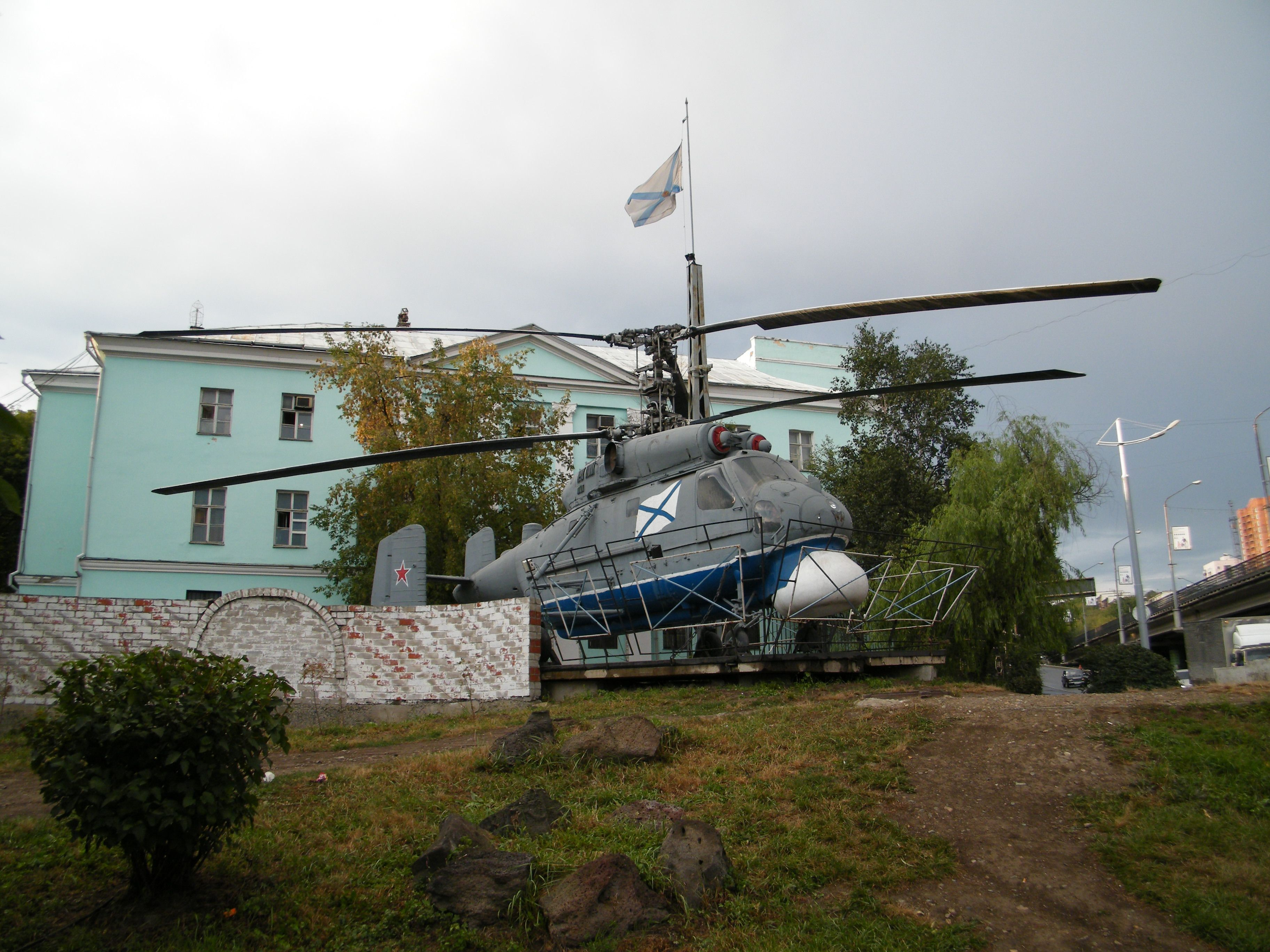 Владивосток, корабельный вертолет Ка-25 на ул. Русская 2011г